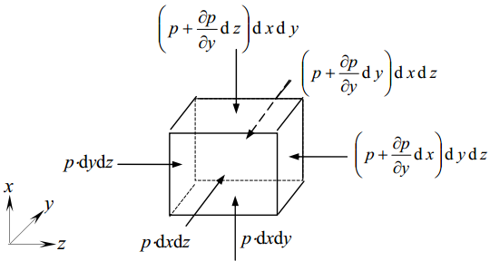 Particulă de fluid aflată sub acţiunea forţelor de suprafaţă